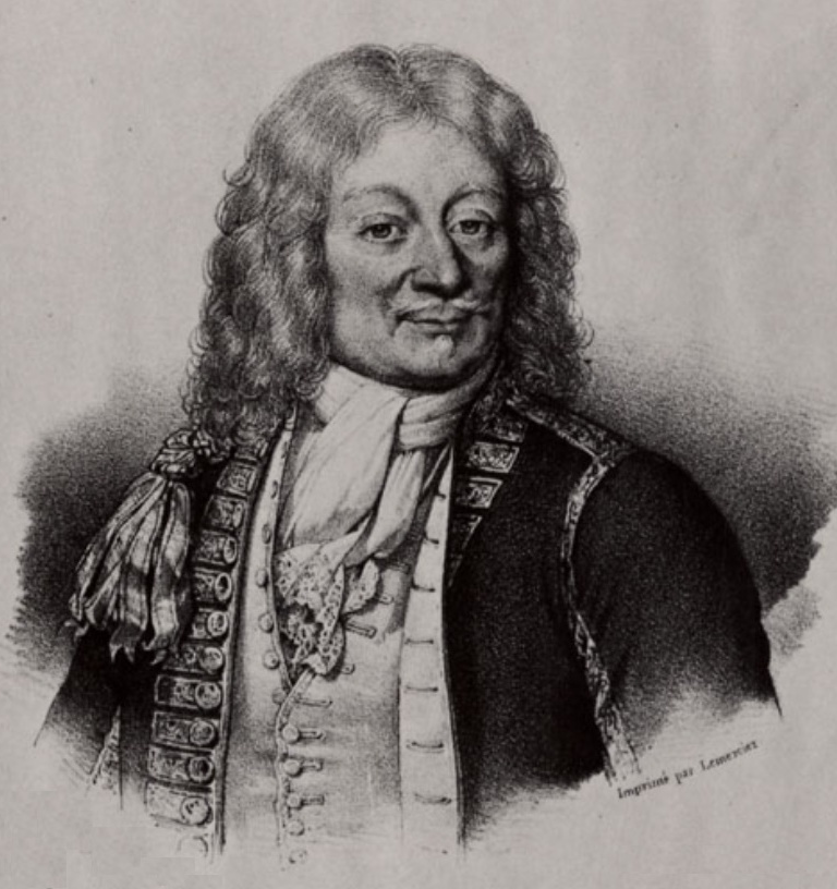 Michel-Ange Duquesne de Menneville (1702 - 1778)